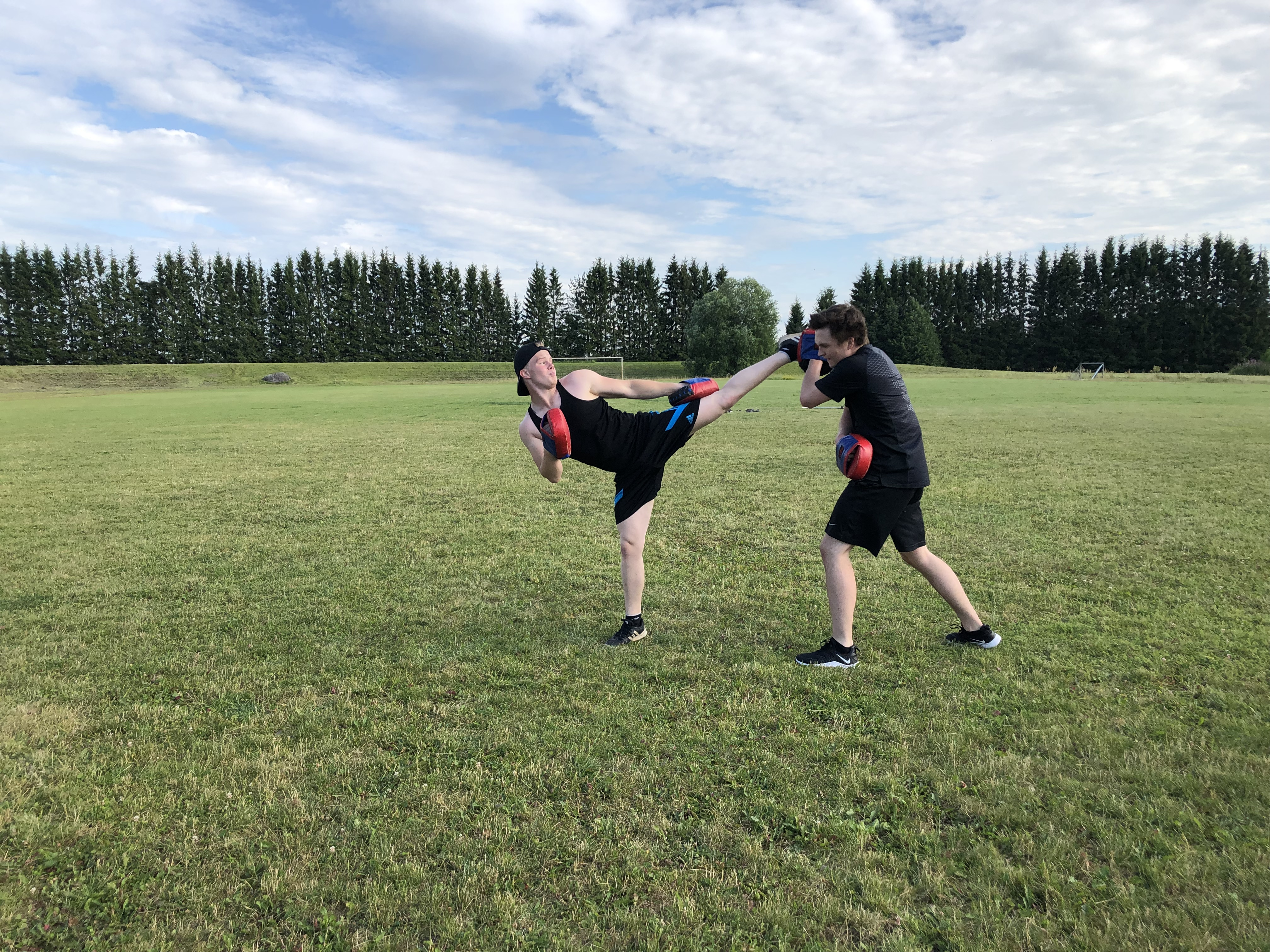 Karate